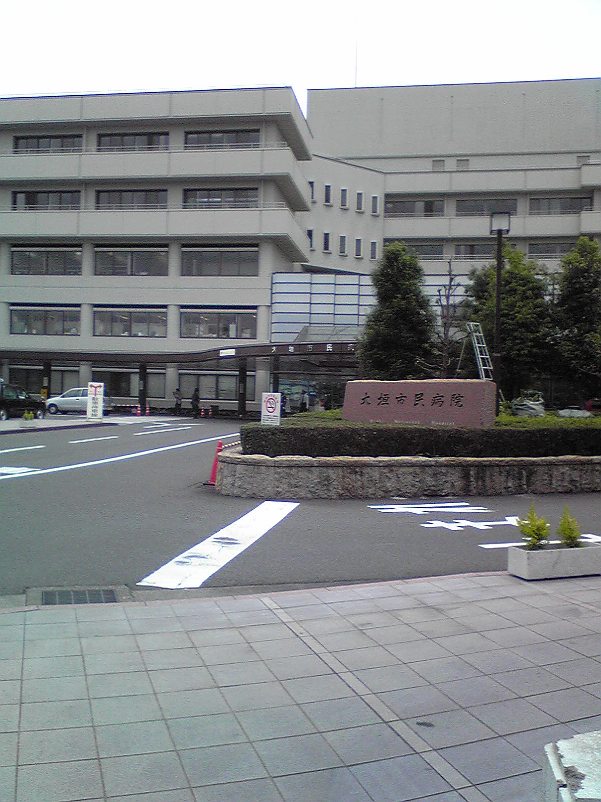 Ogaki_Municipal_Hospital(大垣市民病院),Ogaki,Gifu,Japan(岐阜県大垣市)で南西側より撮影